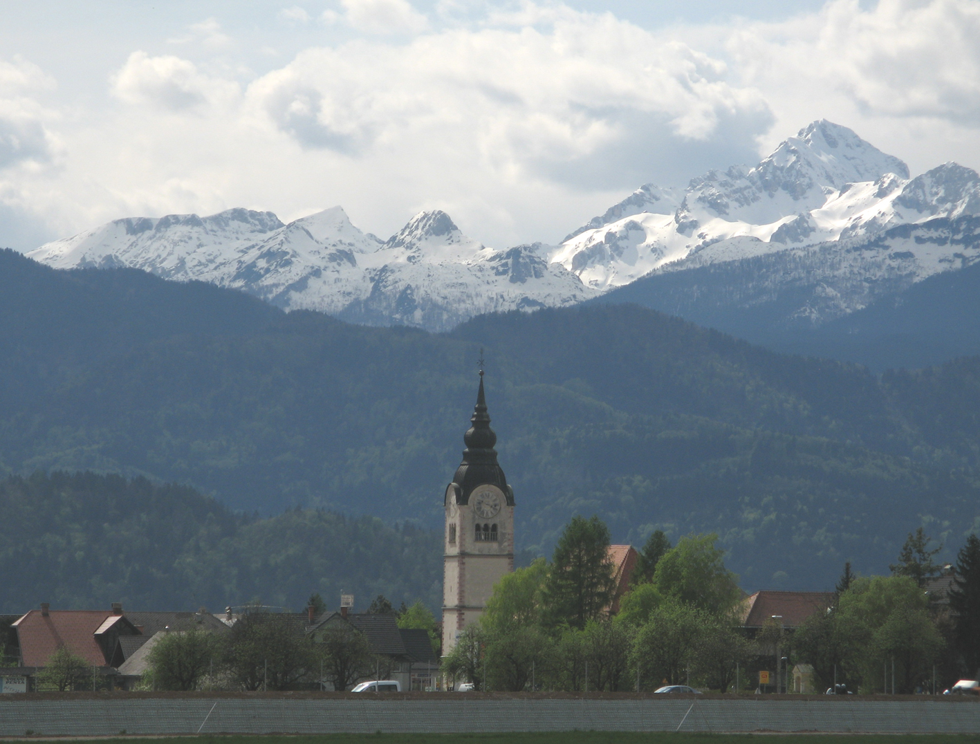 Lesce, Slovenia